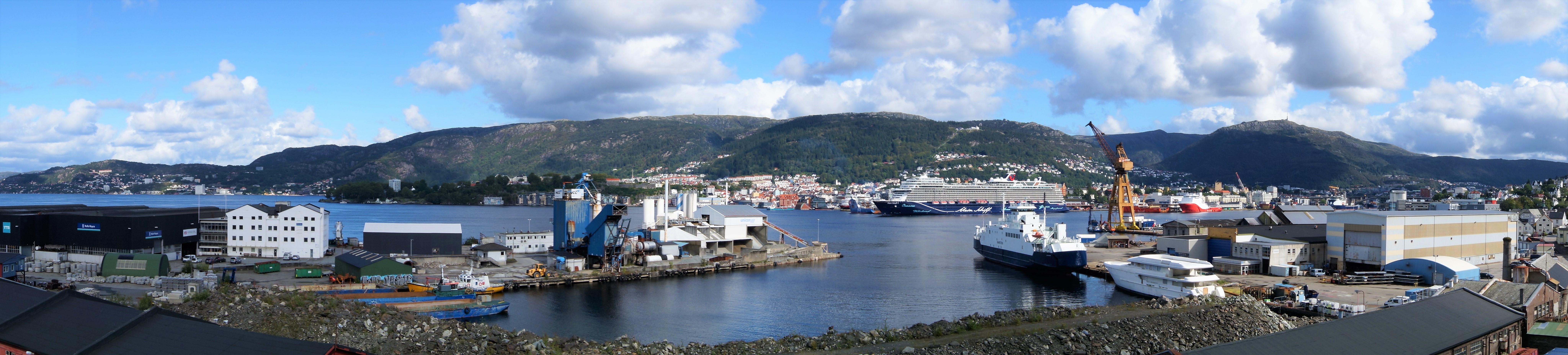 Panoramabilde av verftsområdet på Laksevåg